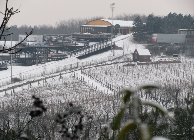 Pohled na vinici Máchalka z estakády Vysočanské ulice spojující Prosek a Vysočany (pozn.: to bude asi spíš z jižní části ulice Nad Kelerkou)